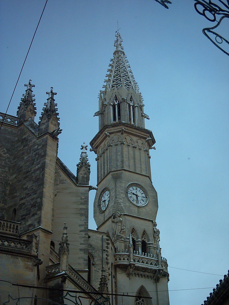 Campanario de la catedral de Manacor.